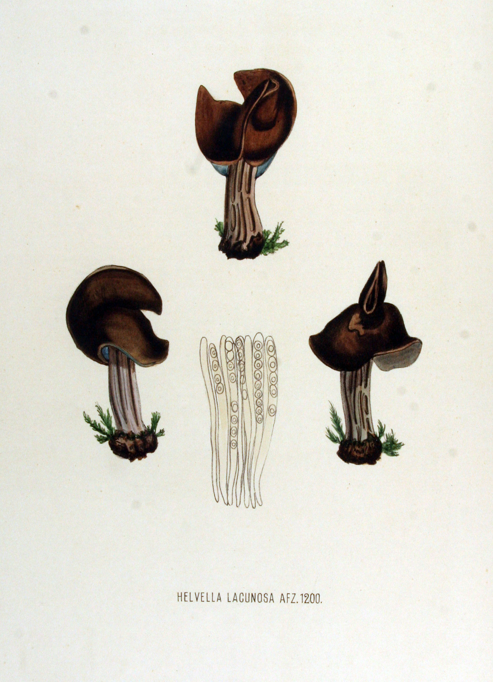 Helvella lacunosa Afzelius 1783